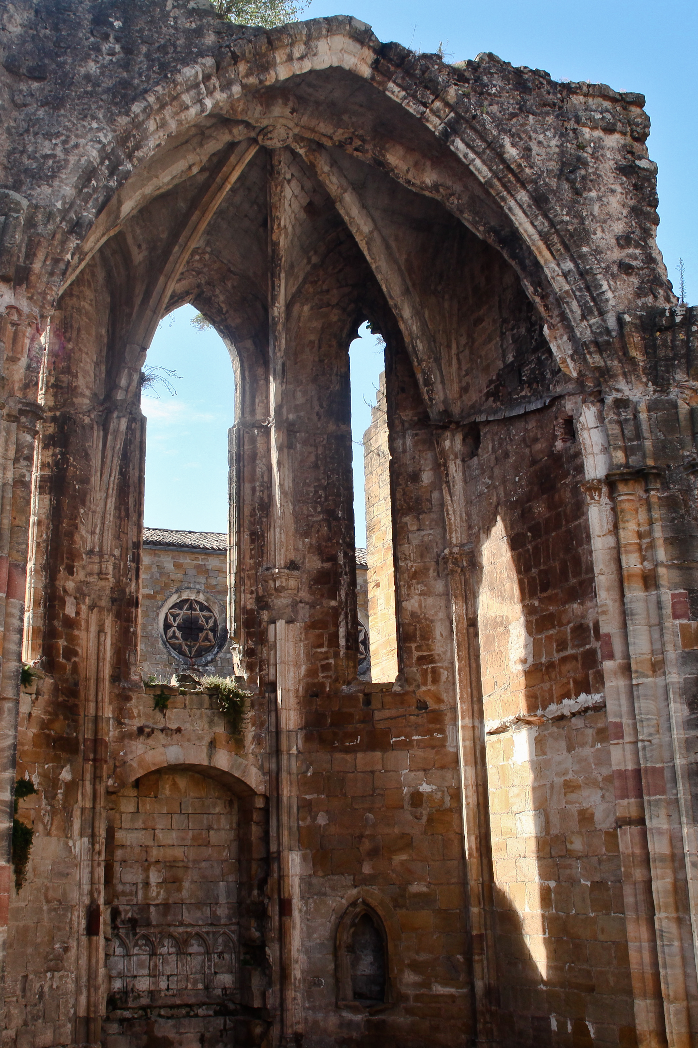 Abbaye d'Alet-les-Bains, nef